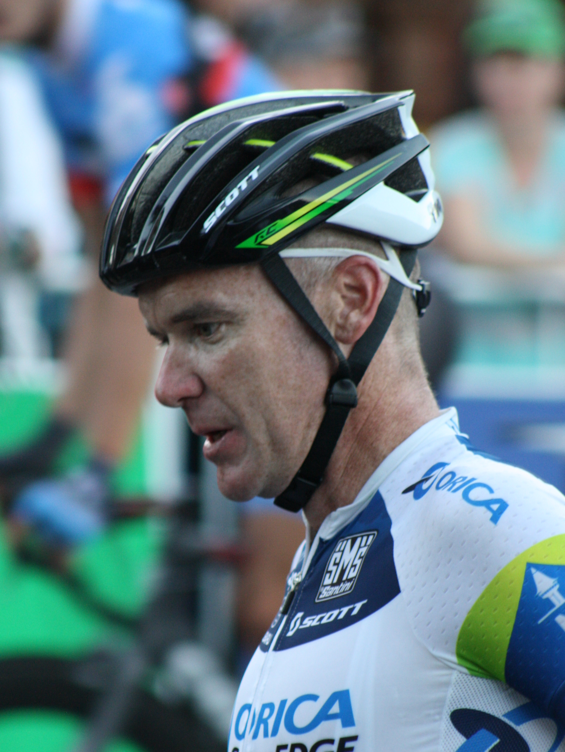 Looks like he has had a hard ride